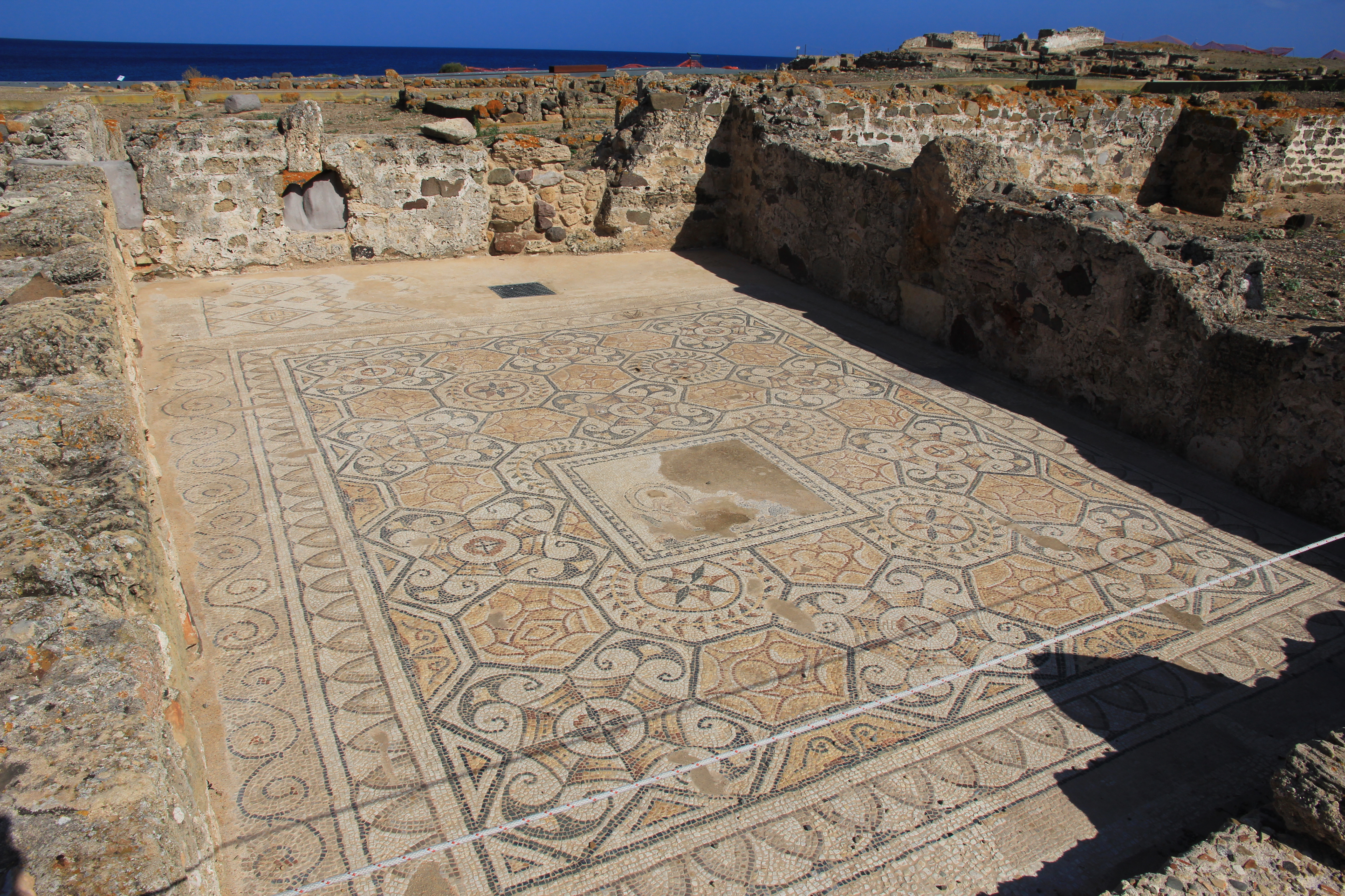 Pula (Italy) - Nora